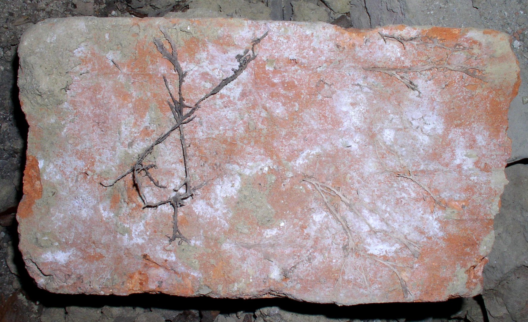 Mauerziegel mit Myzelsträngen des Echten Hausschwamms (Serpula lacrymans)